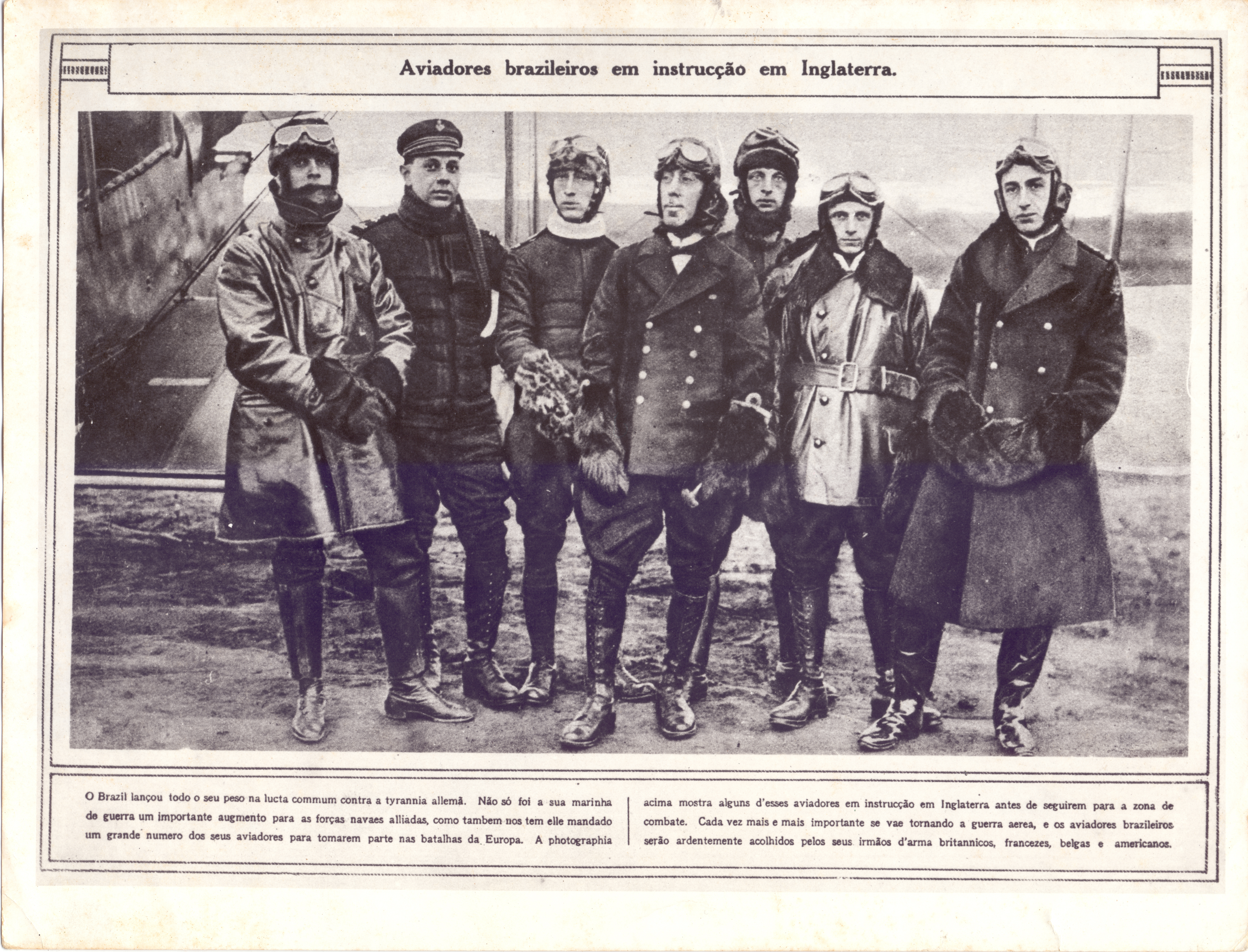 Aviadores brasileiros em instrução na Inglaterra. Da esquerda para a direita: Lauro de Araújo, Heitor Varady, Eugênio da Silva, Virginius Brito de Lamare, Olavo de Araújo, Manoel Augusto Pereira de Vasconcelos e Fábio de Sá Earp. Arquivo liberado pela Marinha do Brasil através de projeto GLAM com Wiki Educação Brasil